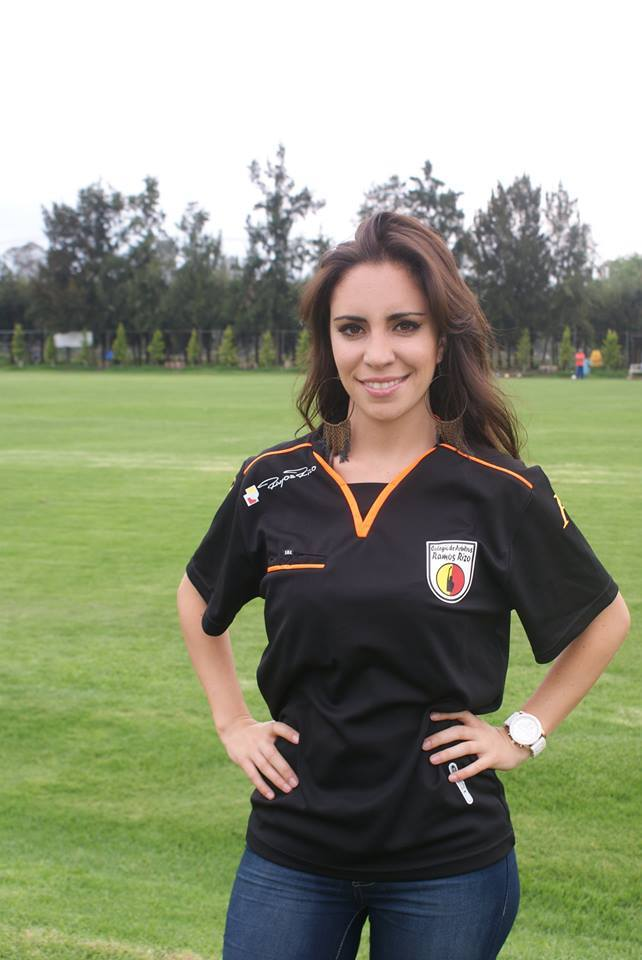 foto de lizette en campo de futbol